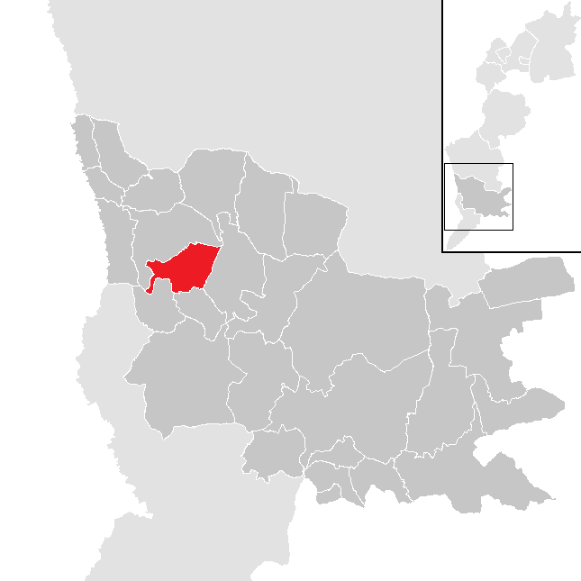 Bezirk Güssing